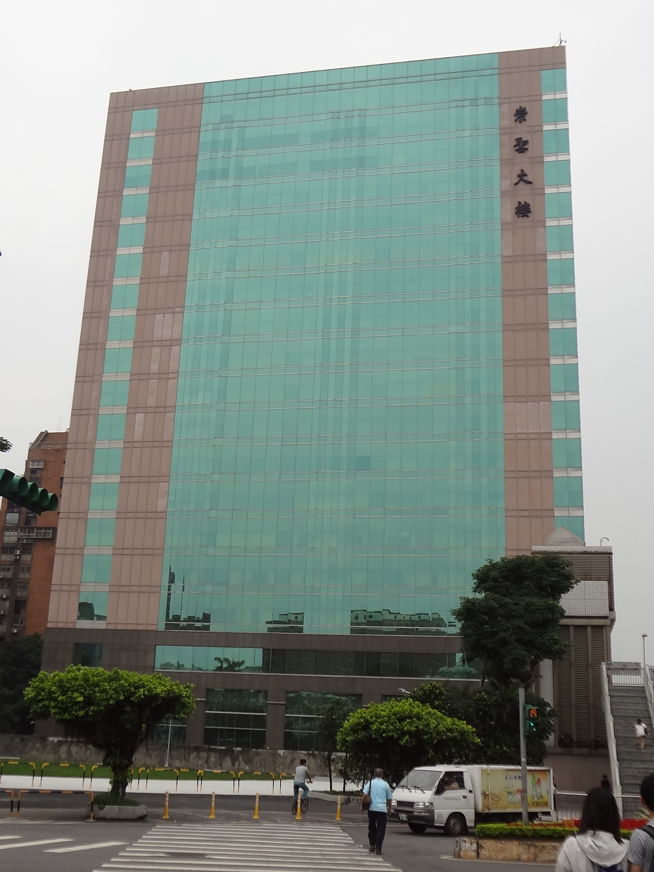 從臺北市中正區中山南路仰望崇聖大樓側面。